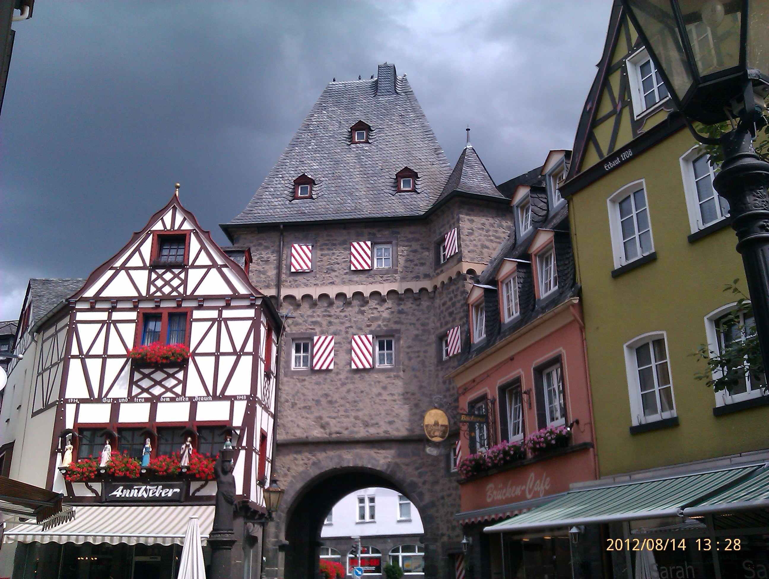 56727 Mayen, Germany